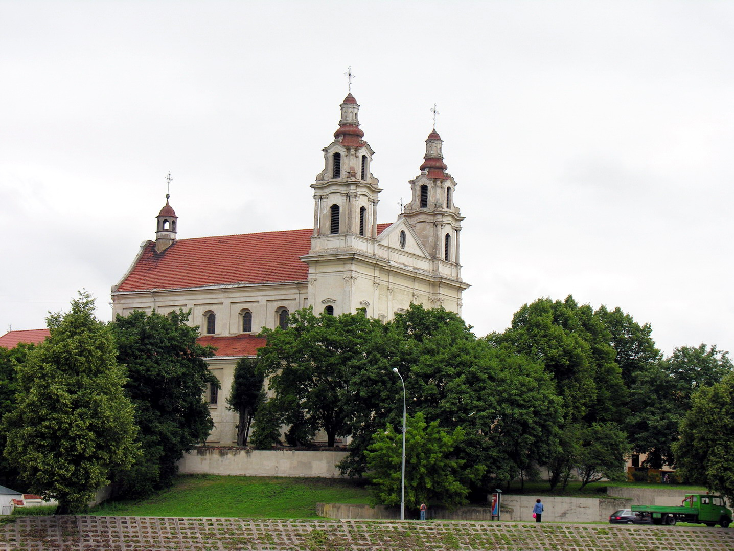 Vilnius Šv. Rapolo bažnyčios ir jėzuitų vienuolyno ansamblis Foto: Algirdas, 2006 m. rugpjūčio 8 d., Lietuva